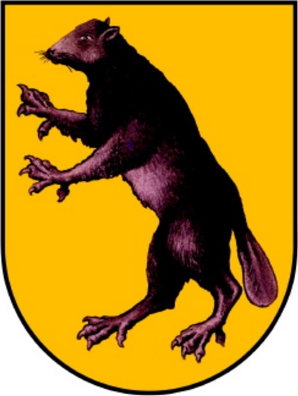 gelb- oder goldfarbener Schild, darauf ein brauner Biber nach der rechten Seite gewendet Kaiser Ferdinand II. erhob das damals dem Maximilian Breuner Freiherrn auf Stübing, Erbkämmerer im Herzogtum Österreich unter der Enns und Oberster Erbkämmerer der fürstlichen Grafschaft Görz, gehörige Dorf Mautern auf Bitten des Besitzers hin am 20. Oktober 1633 zum Markt. Gleichzeitig erfolgte die Verleihung eines Wappens, das allerdings nicht, wie sonst üblich, im Wappenbrief dargestellt, sondern lediglich beschrieben ist. Es stellt in goldenem Schild einen rechtsgewandten (wohl naturfärbig – braun gedachten) Biber dar. Diese Wappenfigur wurde offenbar dem Familienwappen der Breuner entnommen, wo sie im quadrierten Schild im dritten und vierten Feld erscheint. Die Breuner wiederum hatten den Biber 1498 gleichsam erheiratet, als Friedrich Preiner sich mit Regina Gnaser zu Stübing vermählte; und der Biber war das aus dem Jahre 1398 erstmals erhaltene Stammwappen der Gnaser.